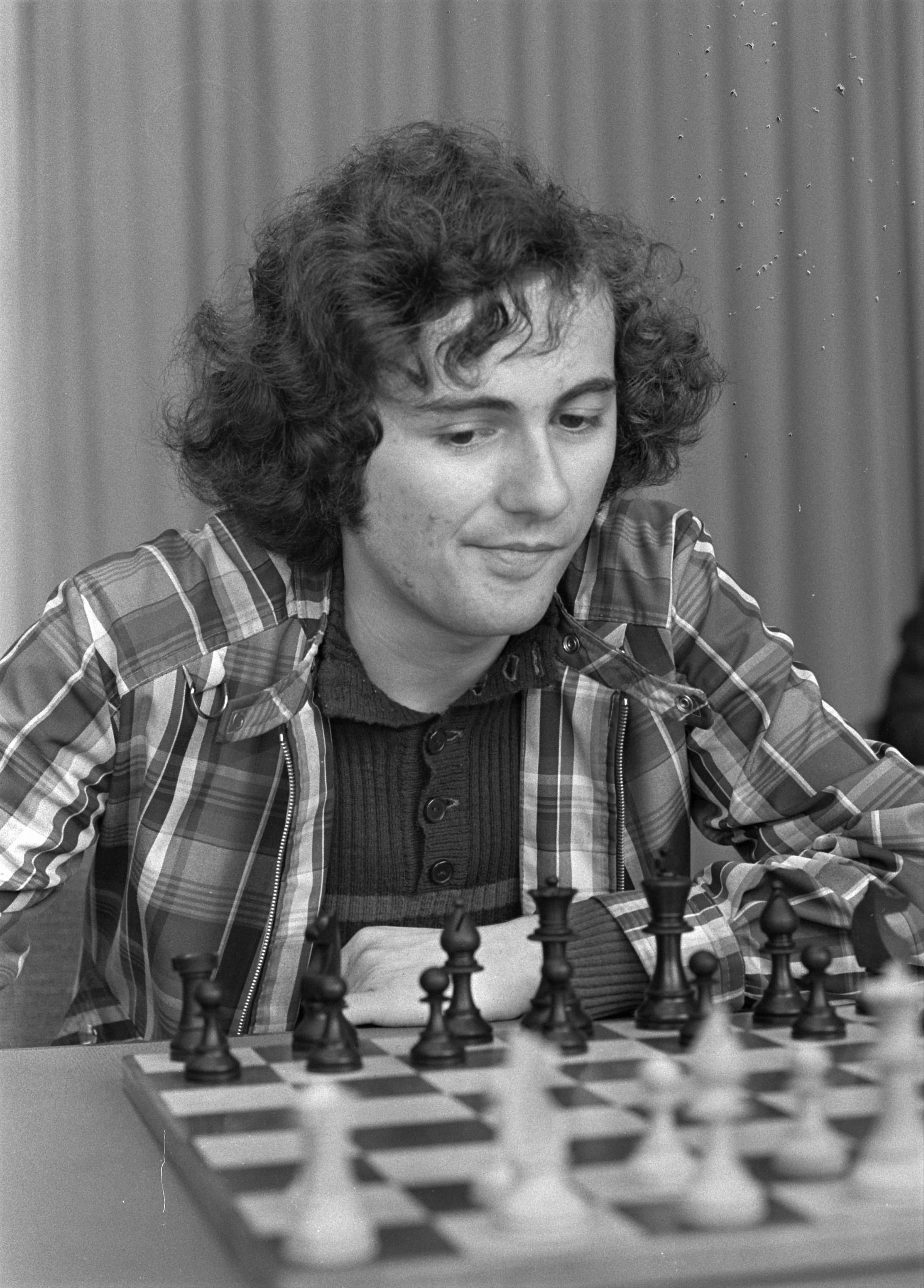 Collectie / Archief : Fotocollectie Anefo Reportage / Serie : [ onbekend ] Beschrijving : IBM-schaaktoernooi in RAI; nr. 16, 17 Knaak (DDR) in actie Datum : 16 juli 1974 Locatie : D.D.R., Duitsland Trefwoorden : schaken Instellingsnaam : IBM-Schaaktoernooi Fotograaf : Croes, Rob C. / Anefo Auteursrechthebbende : Nationaal Archief Materiaalsoort : Negatief (zwart/wit) Nummer archiefinventaris : bekijk toegang 2.24.01.05 Bestanddeelnummer : 927-3292